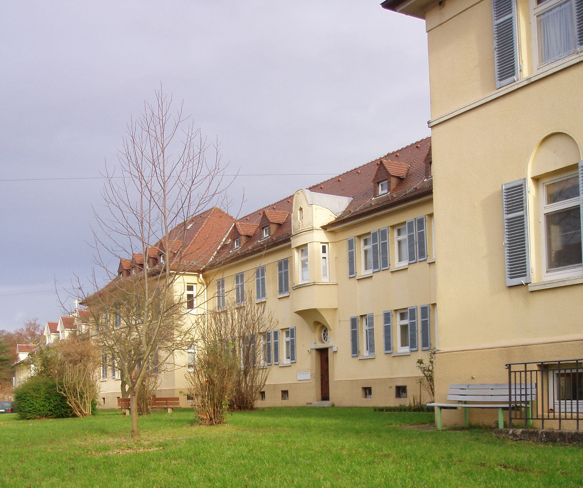 ehemalige Becelaere-Kaserne, Flandernstraßenseite